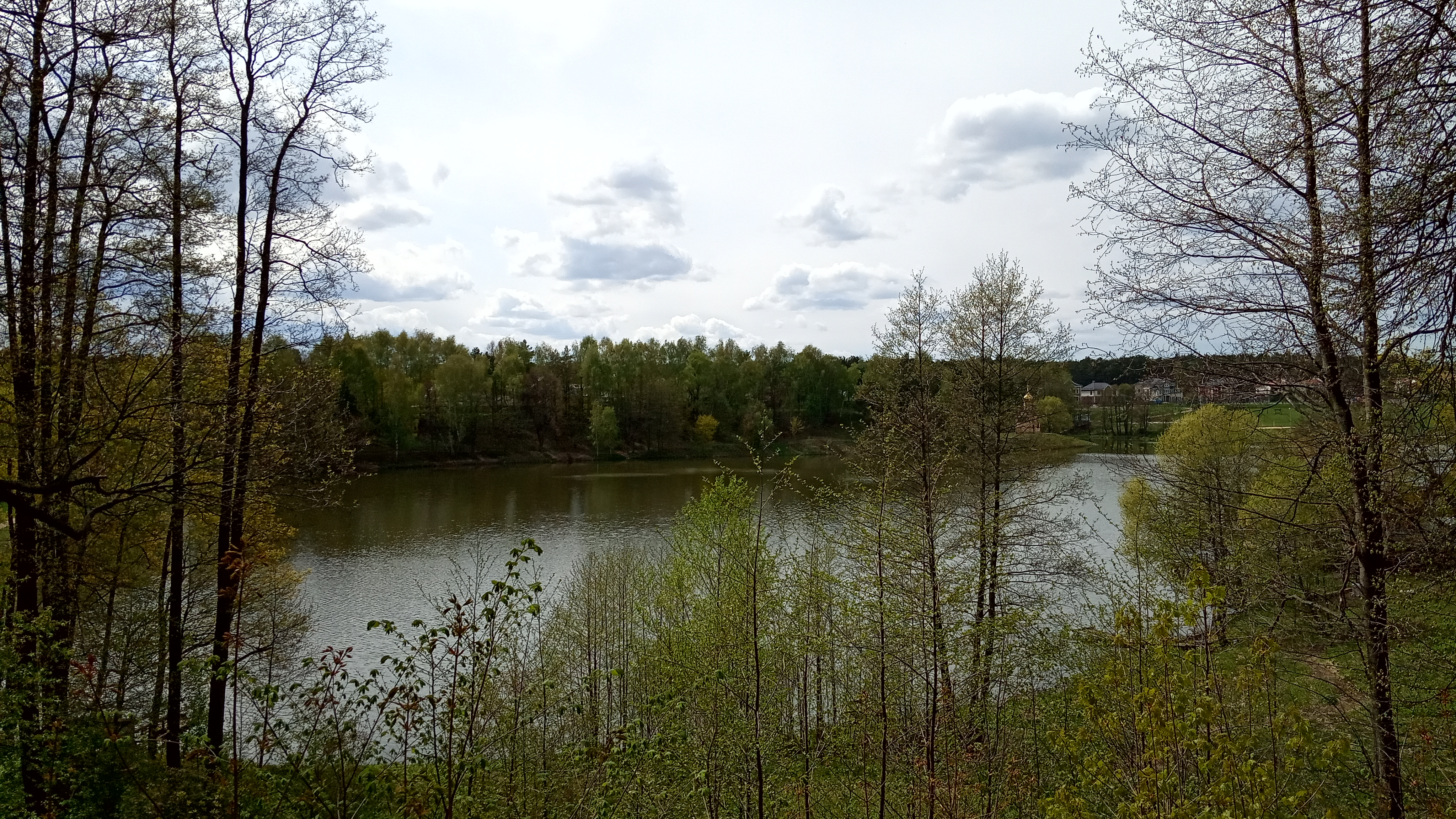 Сухановский пруд на реке Гвоздянке. Вид со стороны усадьбы Суханово.